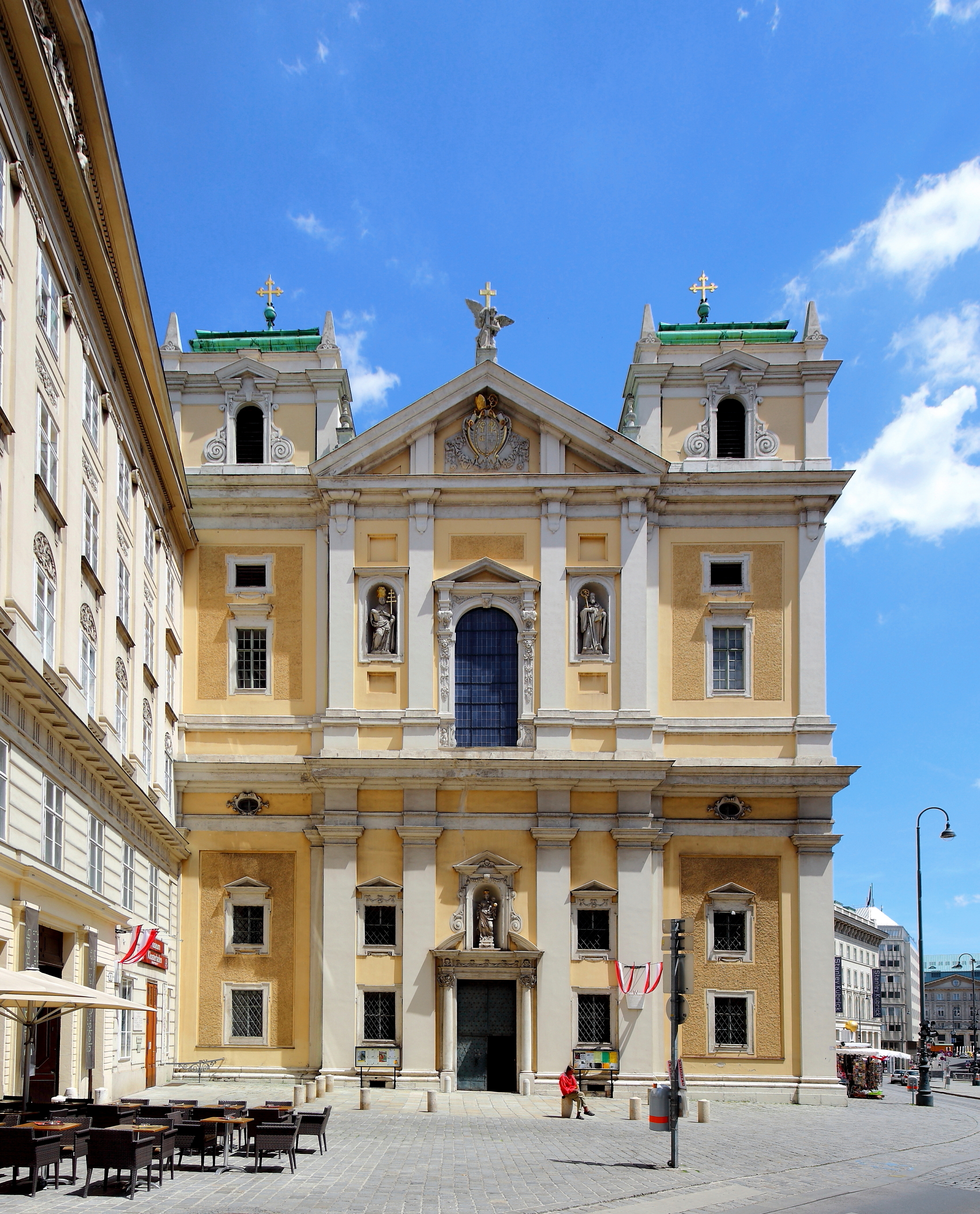 Westfassade bzw. Turmfassade der Schottenkirche im 1. Bezirk der Bundeshauptstadt Wien. Das Hauptportal wurde 1651 vom Hofsteinmetzmeister Bartholomäus Khöll errichtet. Die Statue Maria mit Kind in der Nische über dem Hauptportal ist ein Werk des Bildhauers Tobias Kracker.